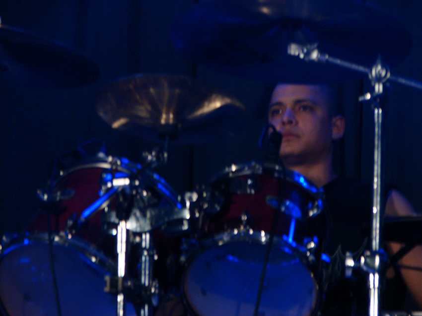 Sickening Horror, groupe de Death Metal grec, au Chaulnes Fest, le 22/03/08: José Théodorakis.